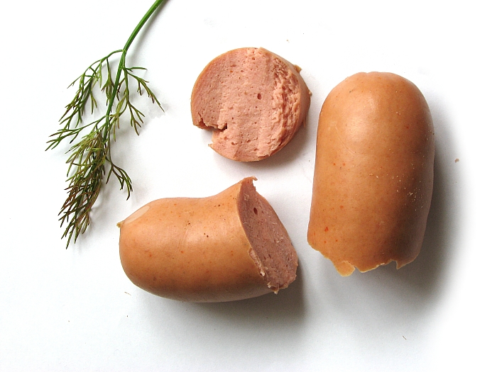 Sausage, parówkowa